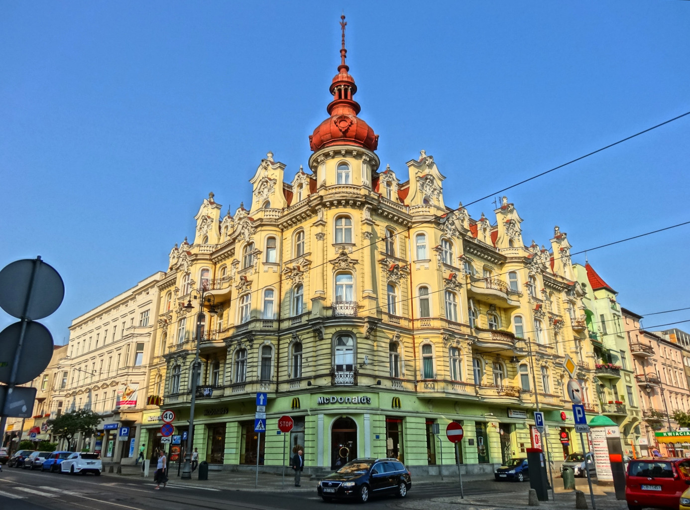 Kamienica Plac Wolności 1 w Bydgoszczy, róg ul. Gdańskiej (1898, aut. Józef Święcicki)